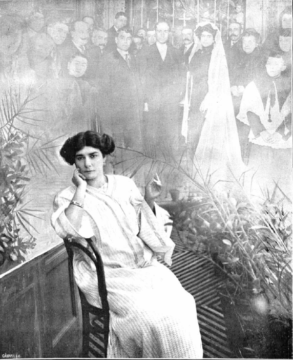 Composición fotográfica de la bailaora Pastora Imperio publicada cuando se tramitaba su divorcio del matador Rafael Gómez Ortega El Gallo, en 1911.